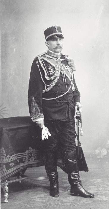 Foto. Studioportret van Luitenant-Generaal J.B. van Heutsz